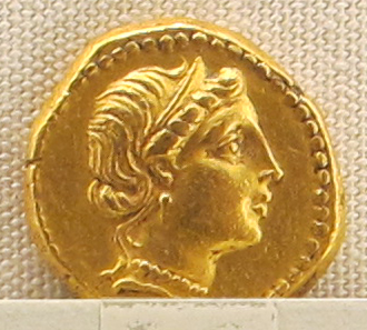 Ancient Roman coins in the Palazzo Massimo alle Terme